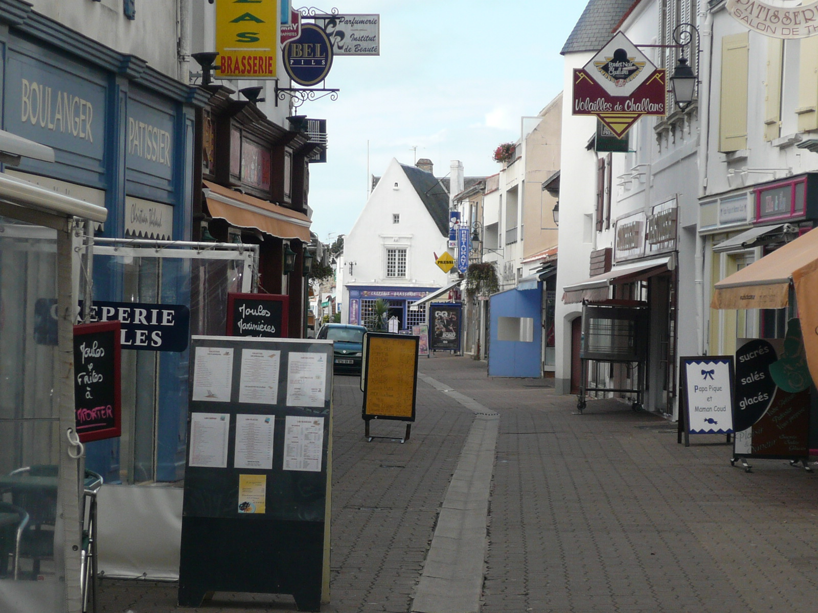 Rue commerçante de Noirmoutier